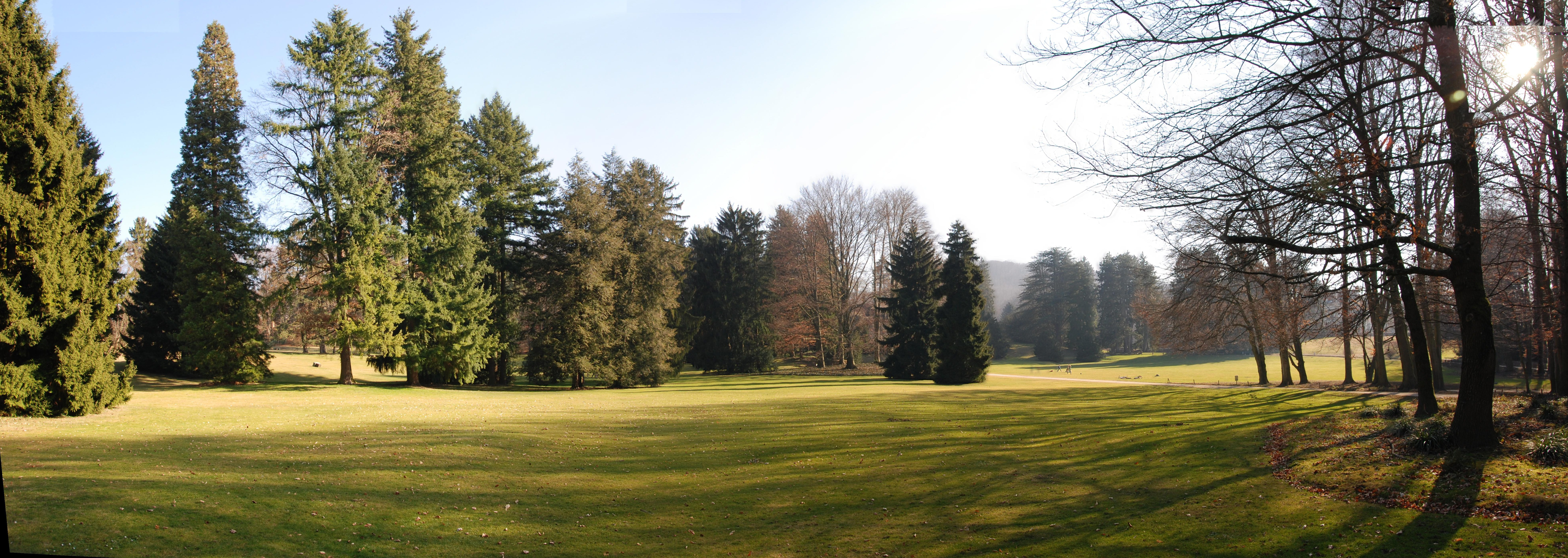 Neuer Wenkenpark, Riehen